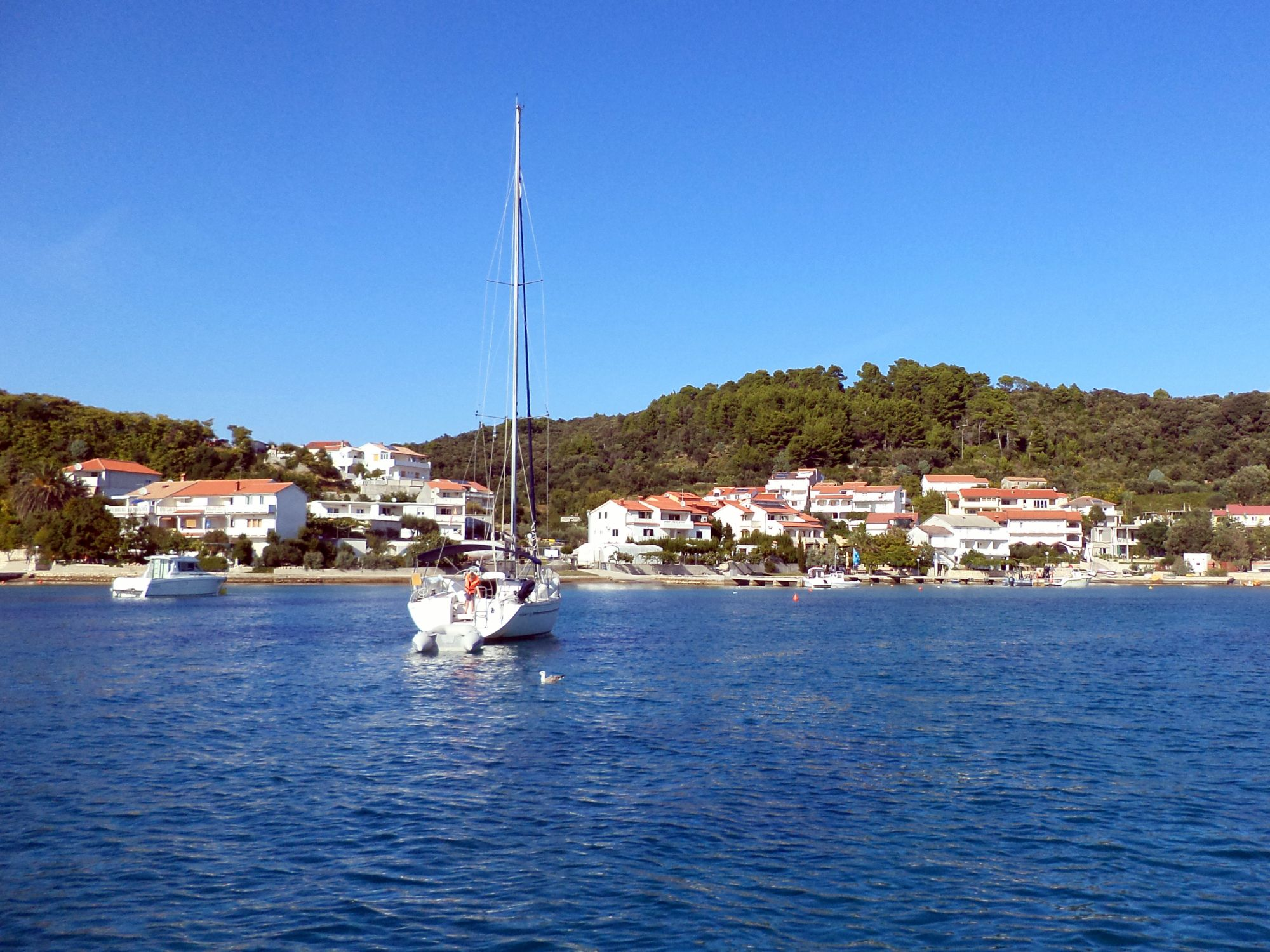 Kampor